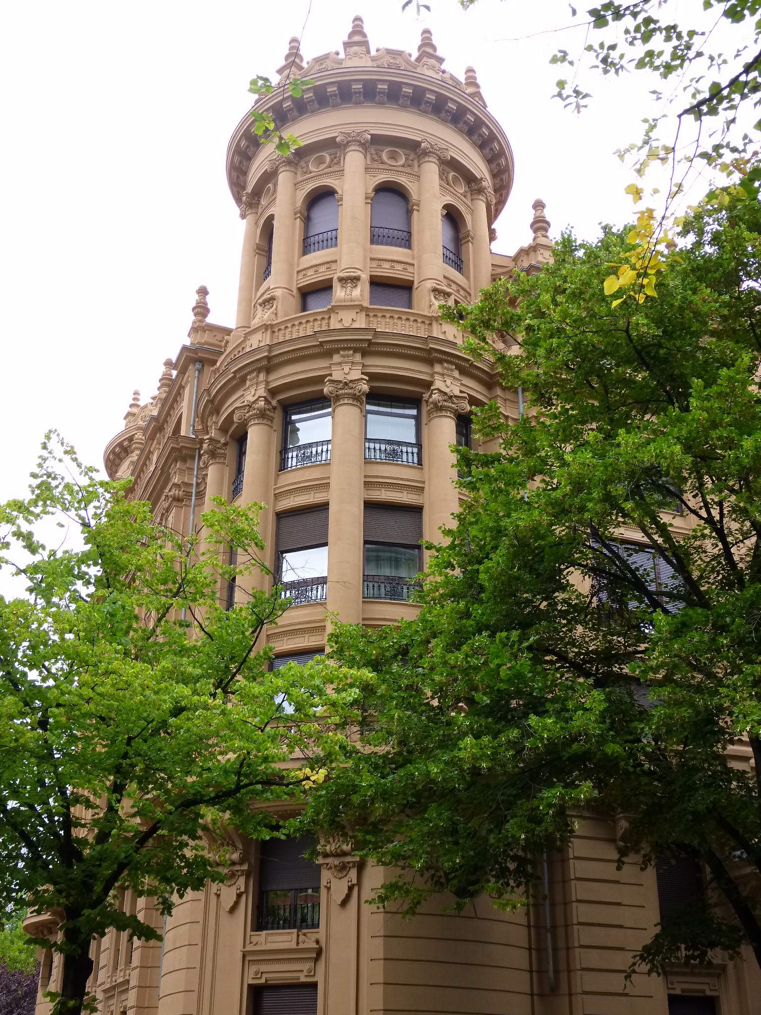 Casa Lezama-Leguizamón (Bilbao)